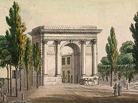 Dipinto dell'antica barriera di porta Vercellina, Milano, ora demolita